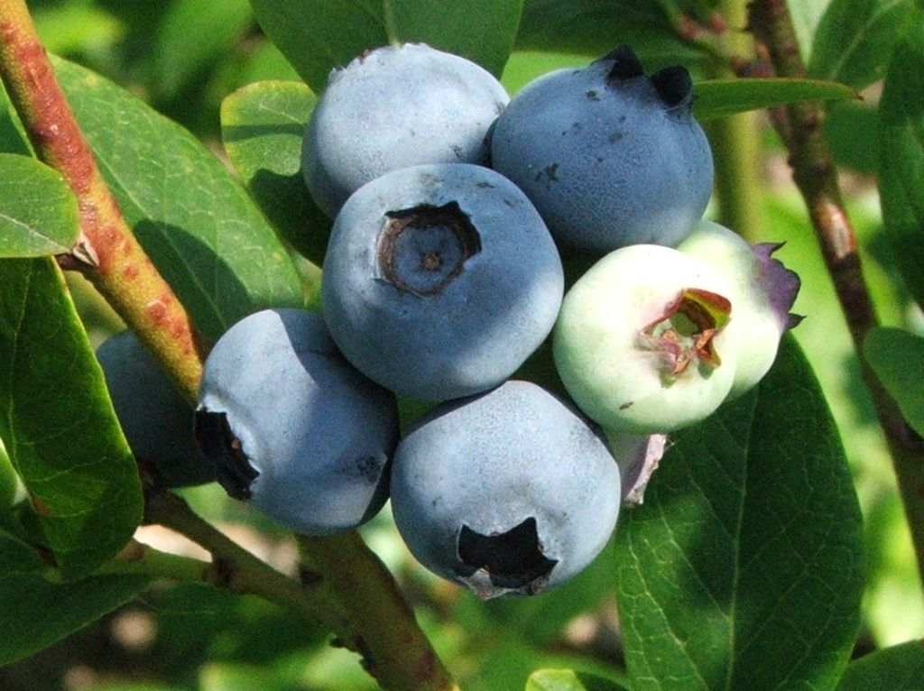 Vaccinium corymbosum (pl. borówka wysoka, borówka amerykańska)